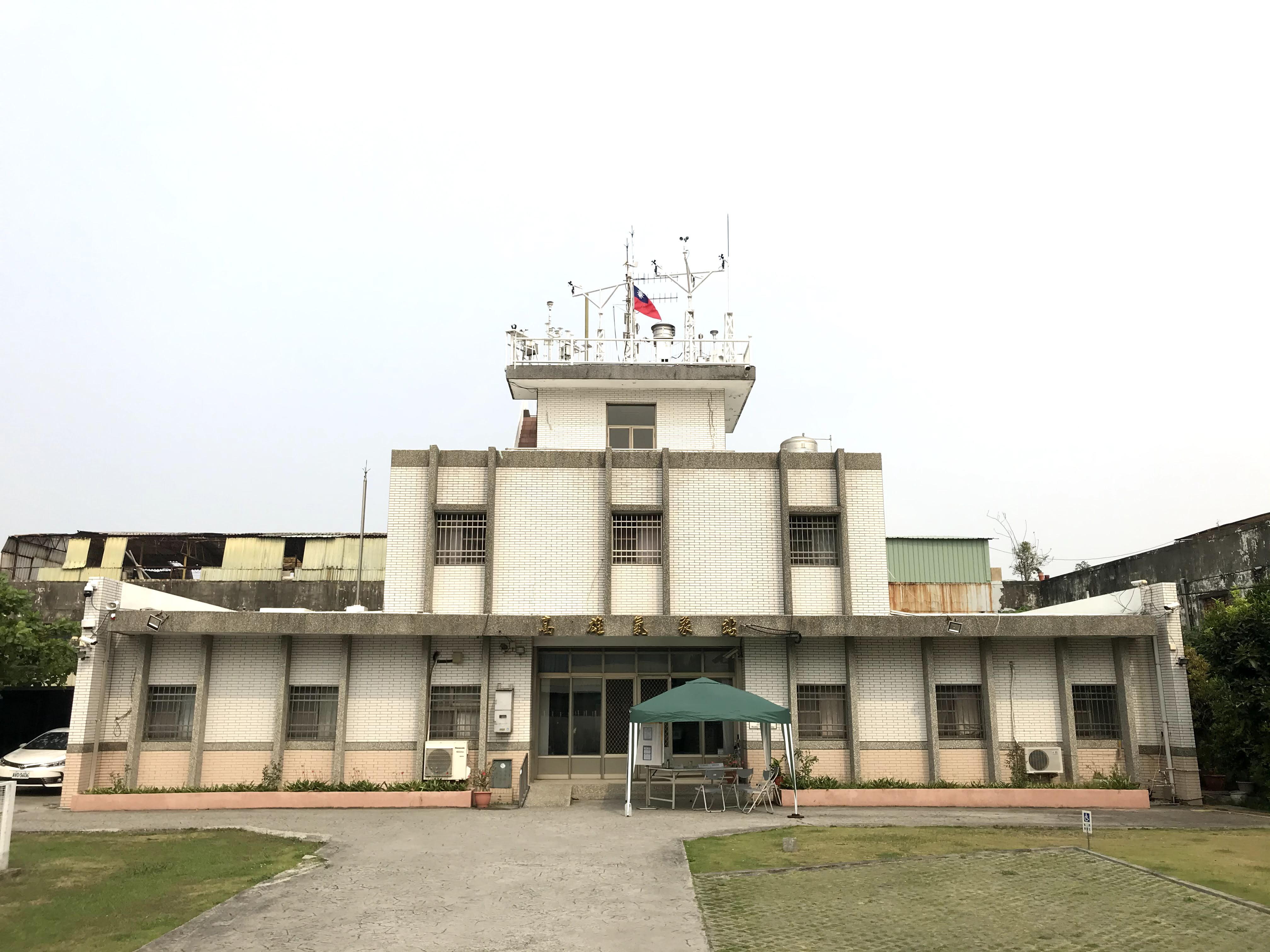 中文（台灣）: 交通部中央氣象局高雄氣象站